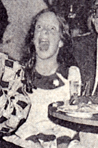 Los cercanos a Cecilia Bolocco celebran su triunfo en el Anfiteatro Lo Castillo en 1987. A la izquierda se encuentra su padre, Enzo, y la niña sentada al lado de la mesa en su hermana Diana.